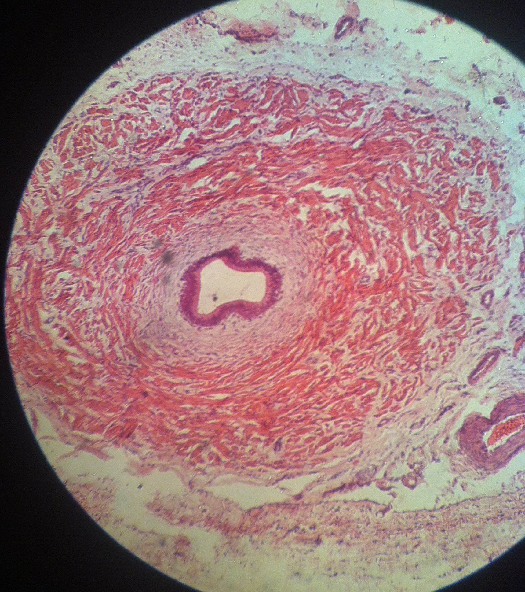 Vas deferns slide